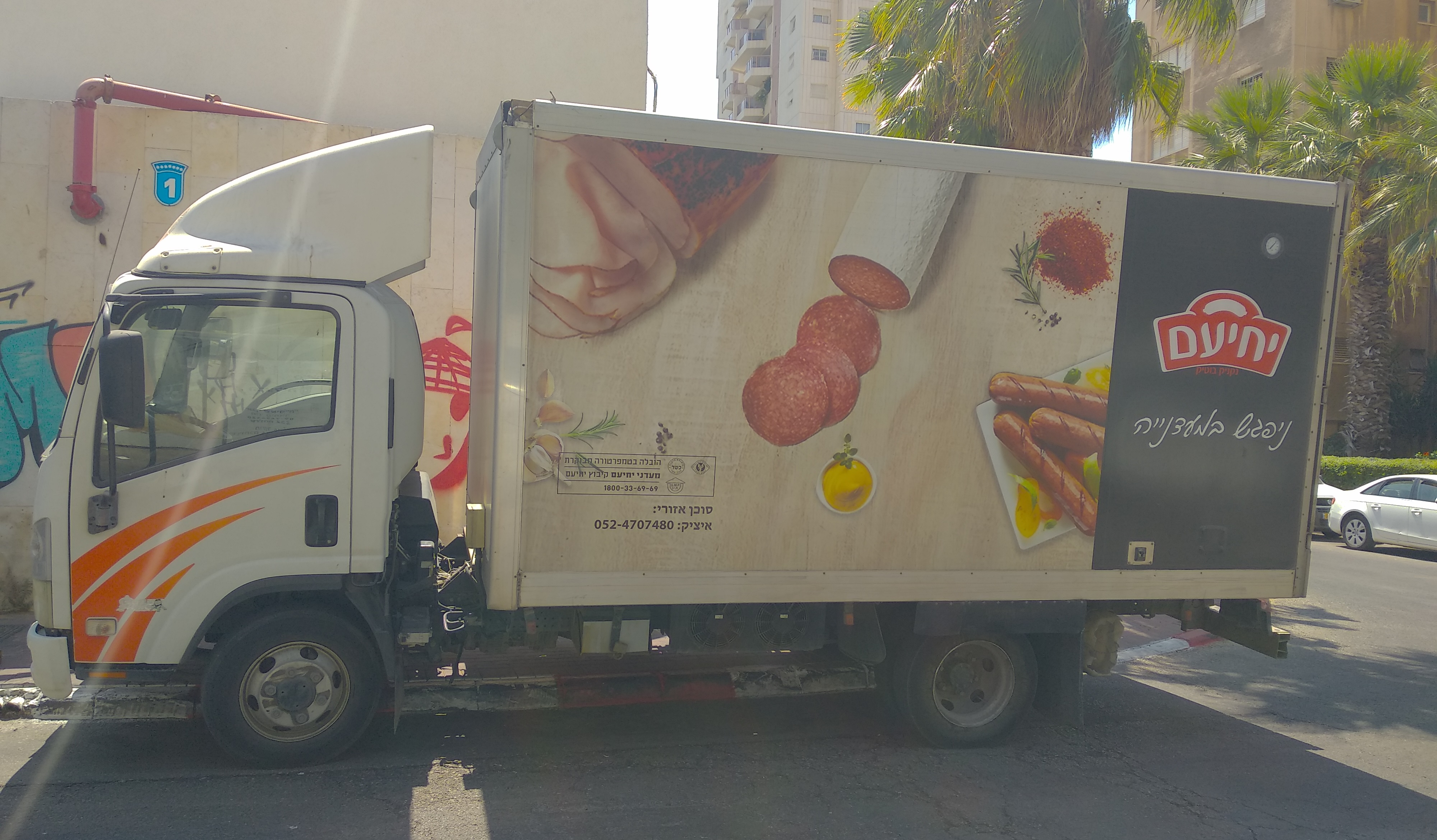 משאית חלוקה של מעדני יחיעם